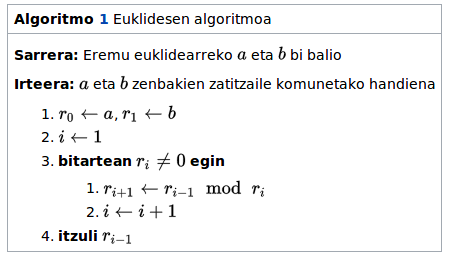 Euklides algoritmoa